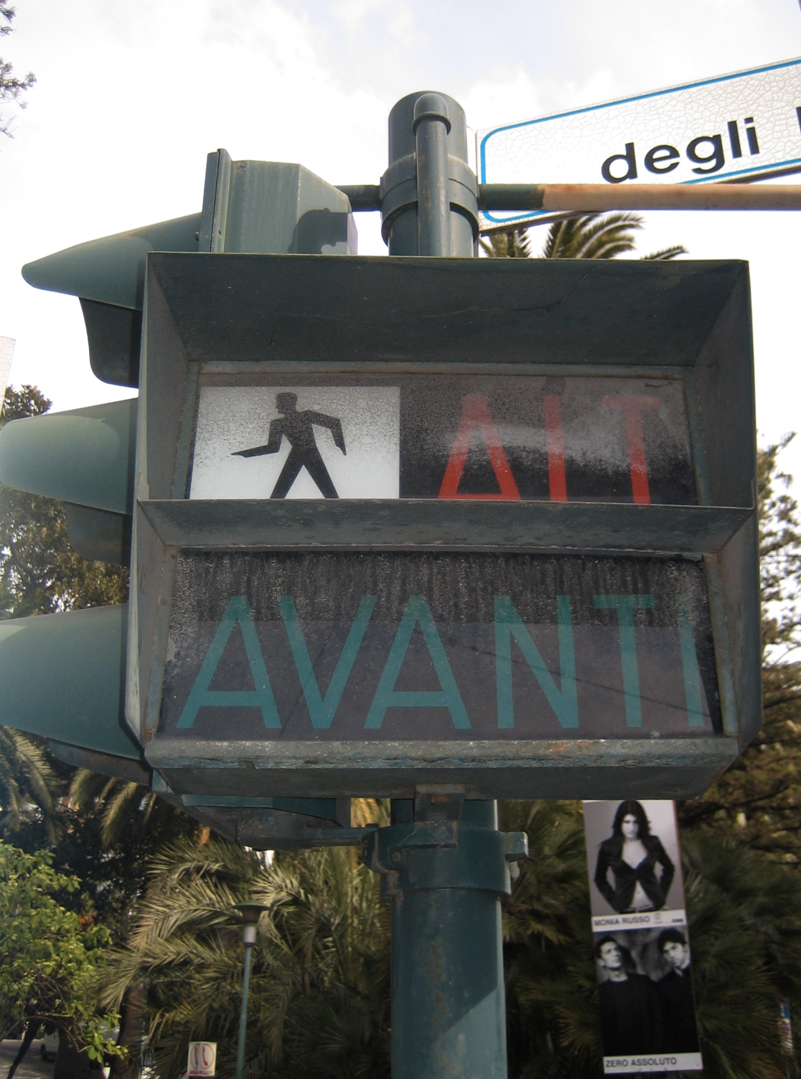 Vecchio semaforo pedonale italiano